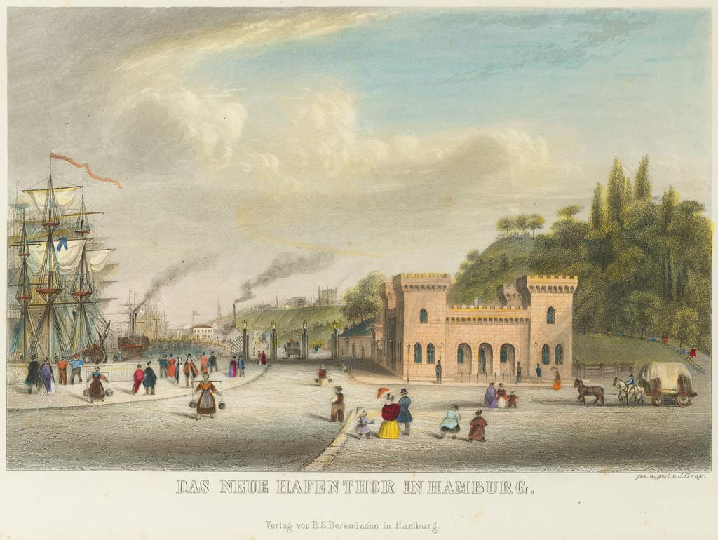 Hamburg, Hafentor (bei den heutigen St. Pauli Landungsbrücken)